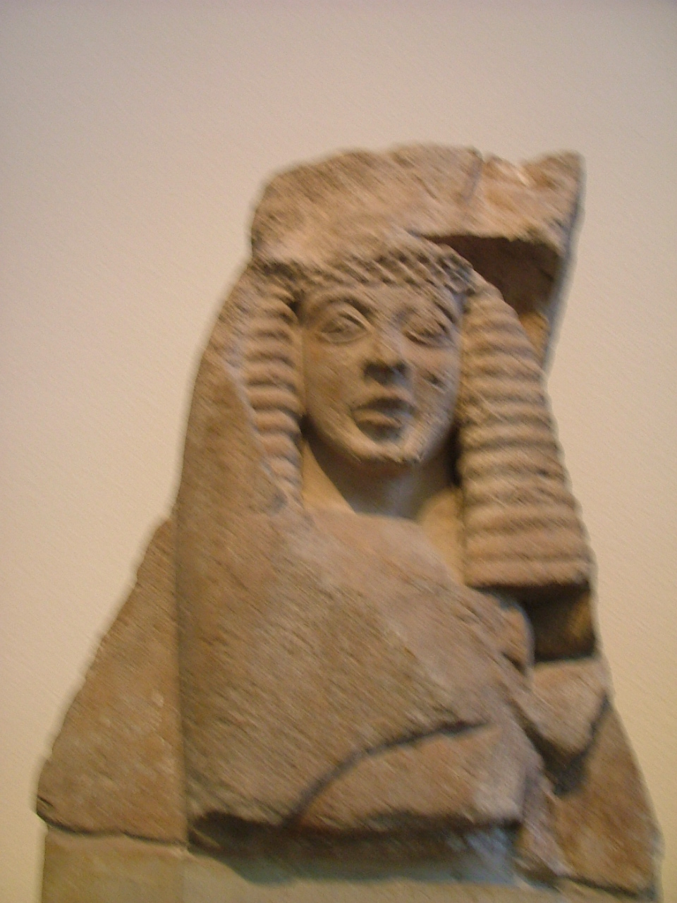 Fragmento nº 2869 de piedra caliza del templo de Atenas en la acrópolis de Micenas. Retrata el cuerpo superior de una mujer (probablemente una diosa) con una capa o manto sobre su capa sobre cabeza, con un gesto de modestia y solemnidad, característico de la diosa Hera. Obra del estilo dedálico, hecha por artistas corintios probablemente. Circa 630 - 620 a. C. Museo Arqueológico Nacial de Atenas.